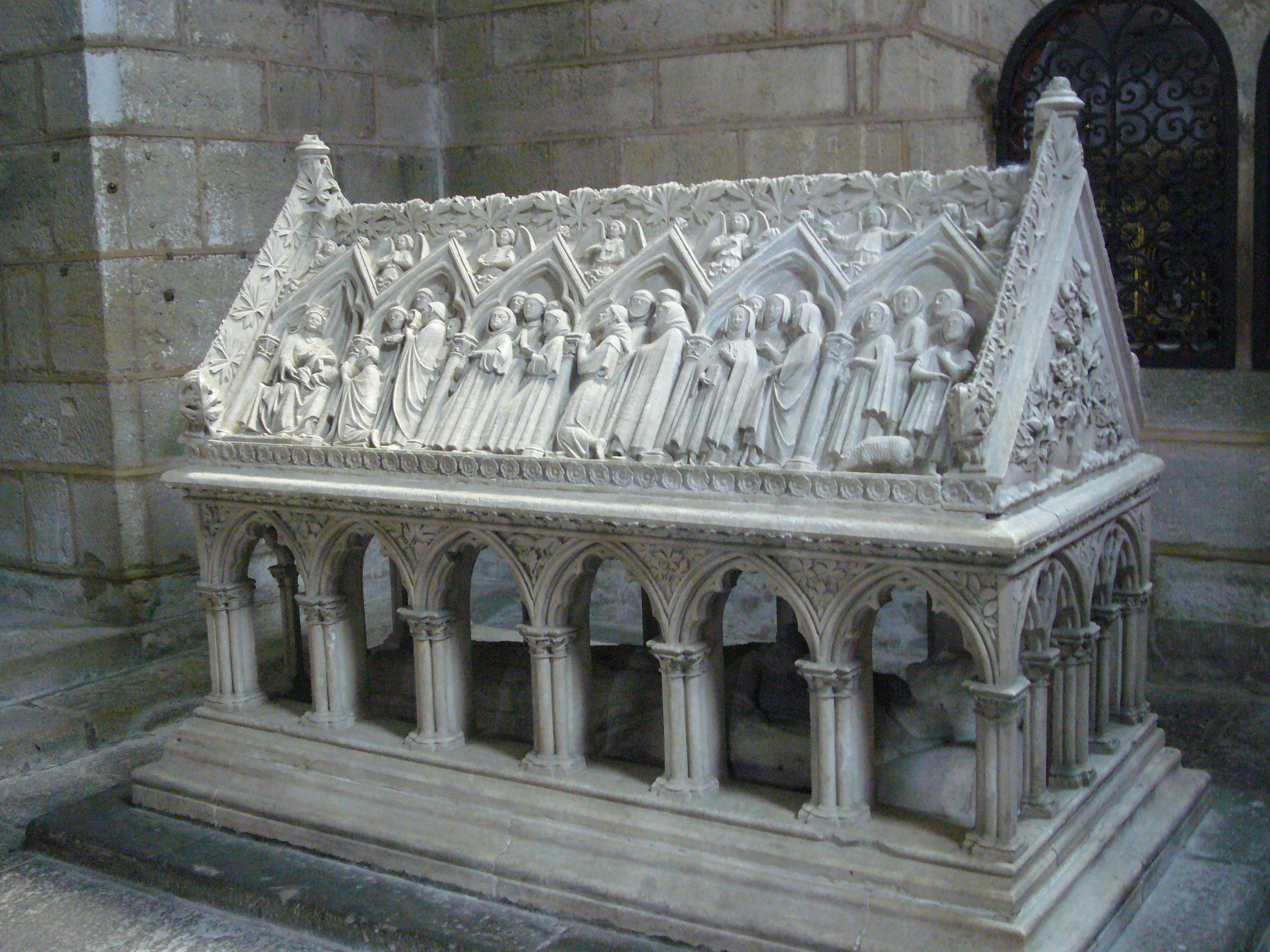 Tombeau de Saint Étienne d'Obazine, Église abbatiale d'Aubazine, Corrèze, France